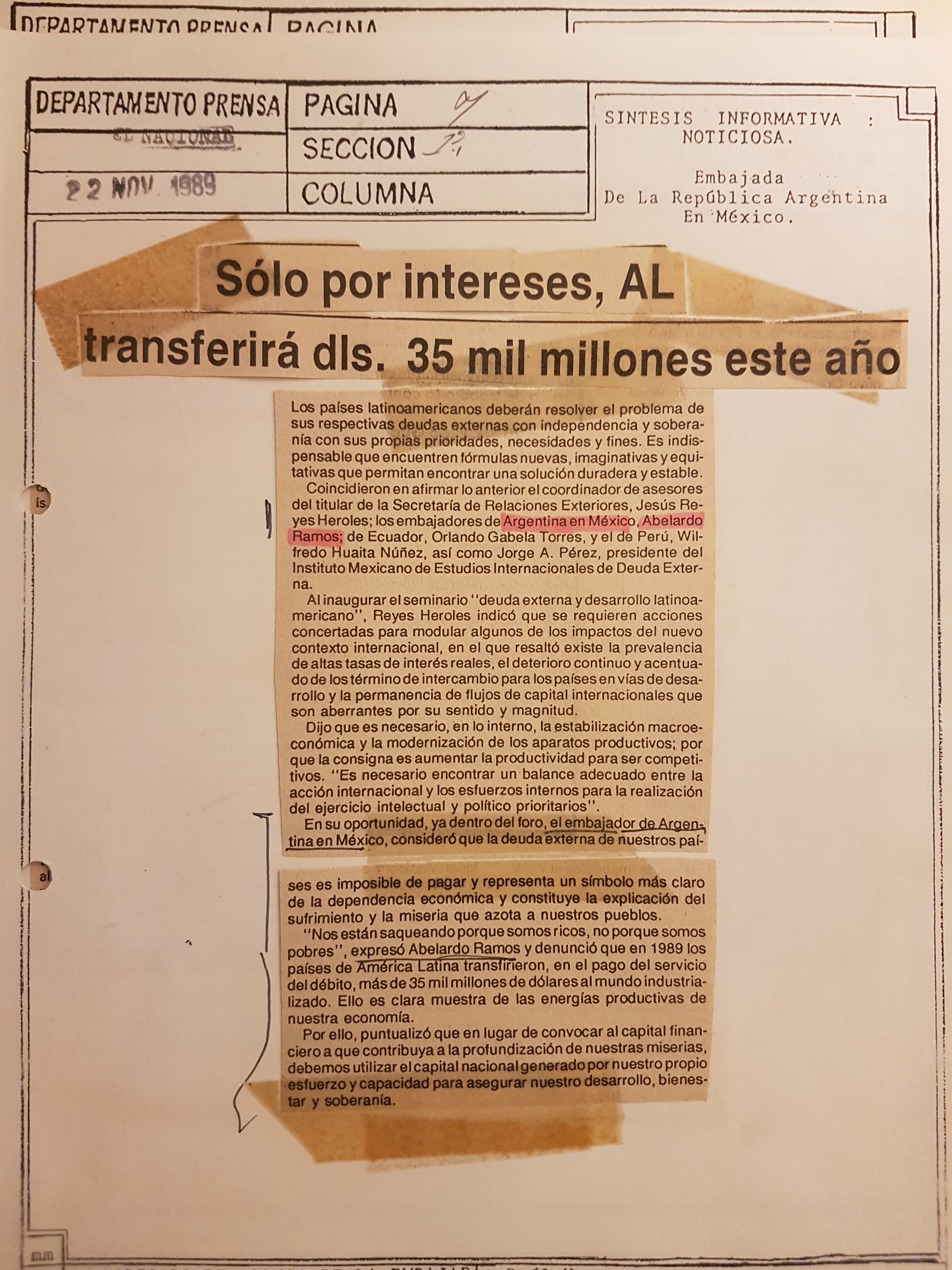 El Embajador Ramos, repudia al imperialismo de EEUU